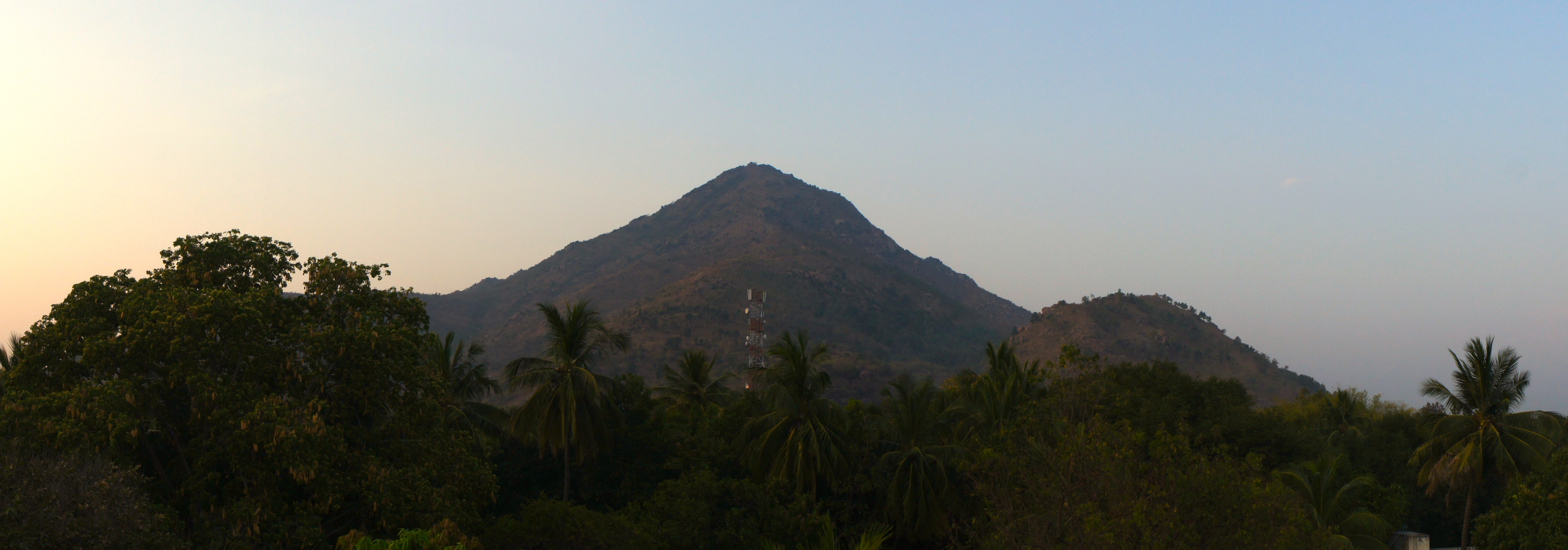 Arunachala hill view panorama march 2013